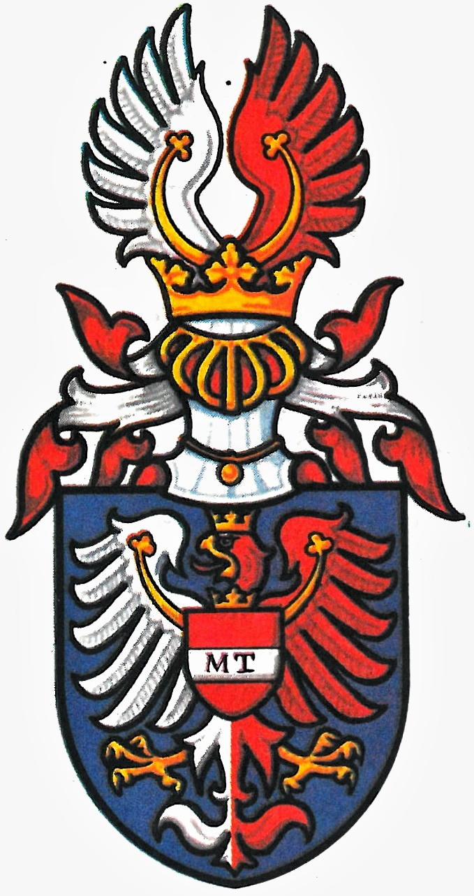 Erb rodu Čejků z Olbramovic